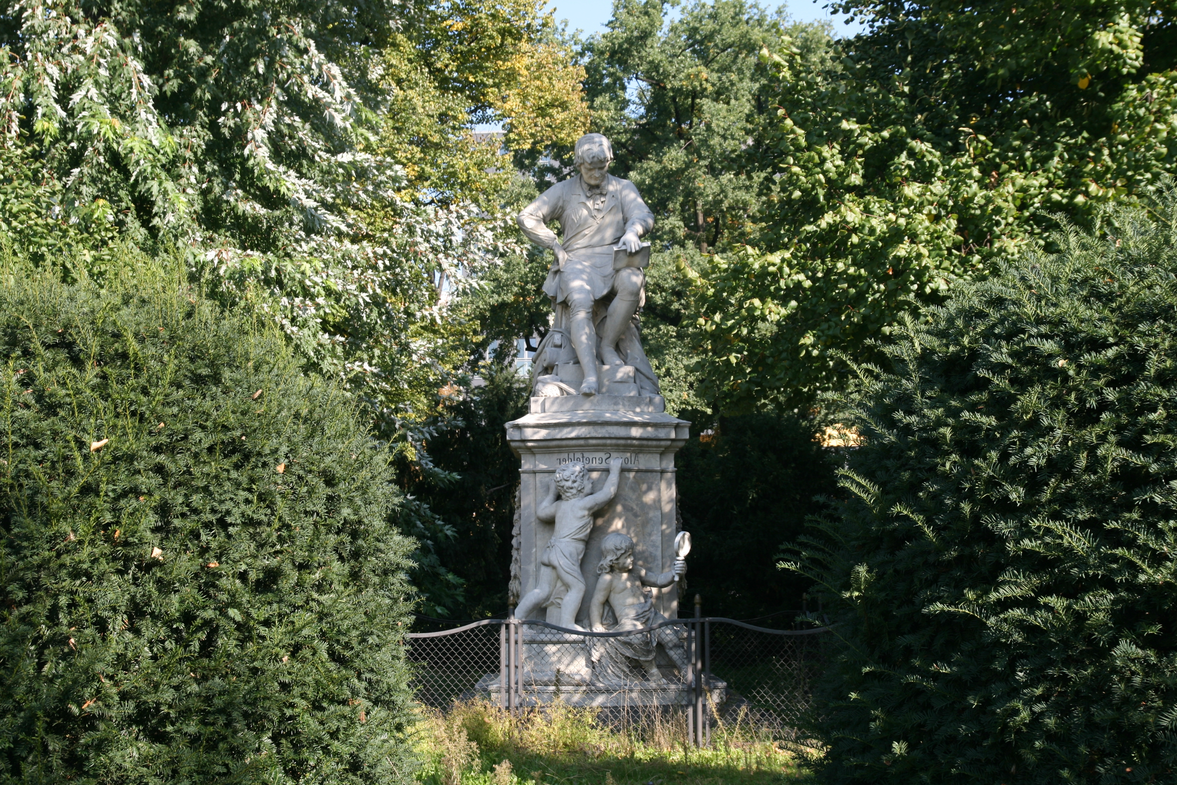 Denkmal - Alois Senefelder ( Erfinder des Steindrucks ) Baudenkmal - Denkmal Entwurf : Rudolf Pohle / Bildhauer Senefelderplatz Berlin - Prenzlauer Berg Quelle: Landesdenkmalliste - Berlin Dok - Nr. 09050111 Quelle